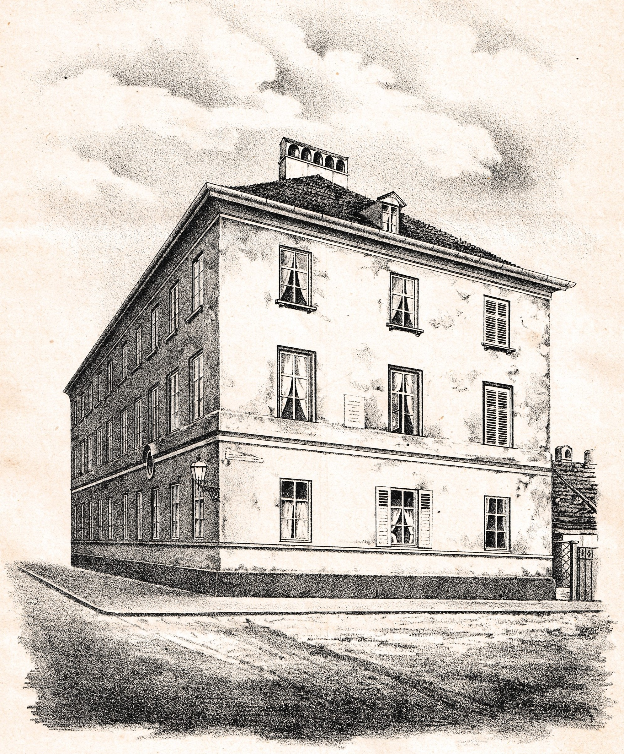 Gabelsberger Wohnhaus in München. Illustration aus: Illustrirte Zeitung für Gabelsberger’sche Stenographen 3. Jahrgang 1880 Nr. 1